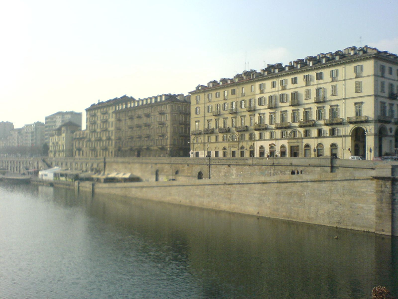 Lungopo di Torino, Italia.